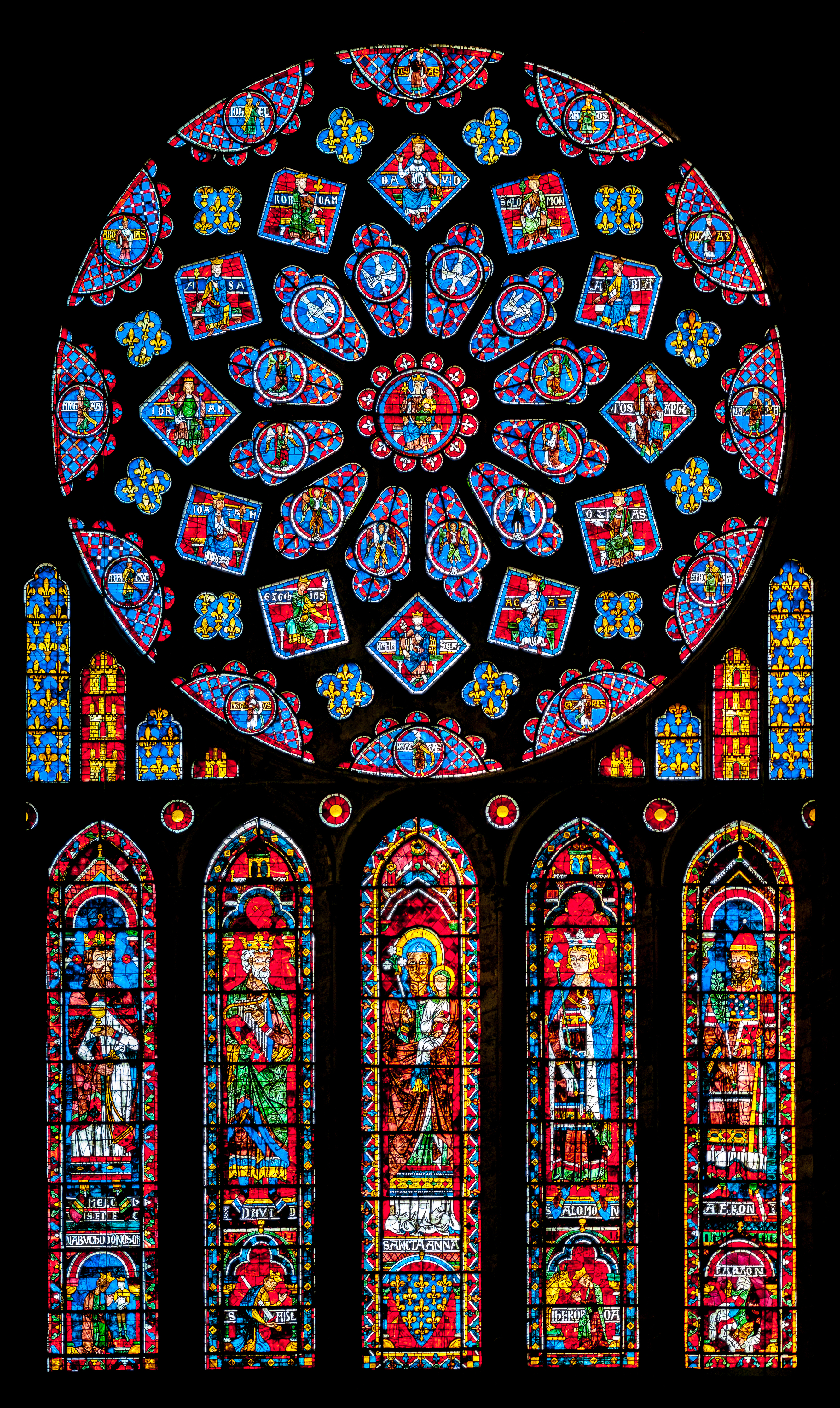 Fensterrosette Nord (baie 121)